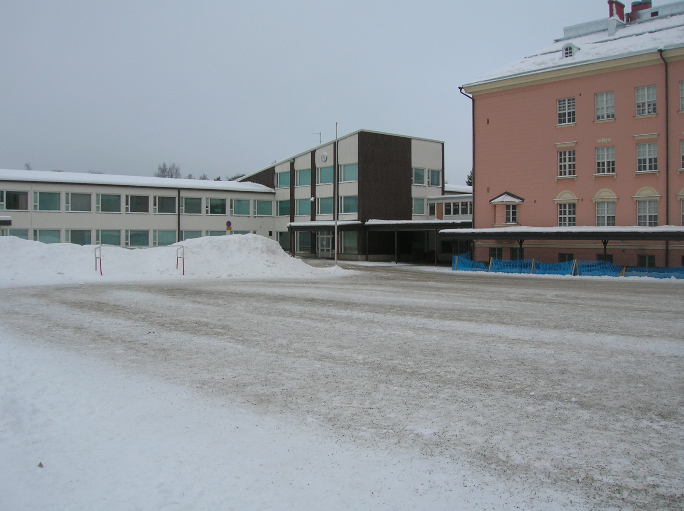 Vuonna 1925 valmistunut Cygnaeuksen kansakoulu ja sen 1961 valmistunut siipirakennus. Kuva tammikuu 2006.